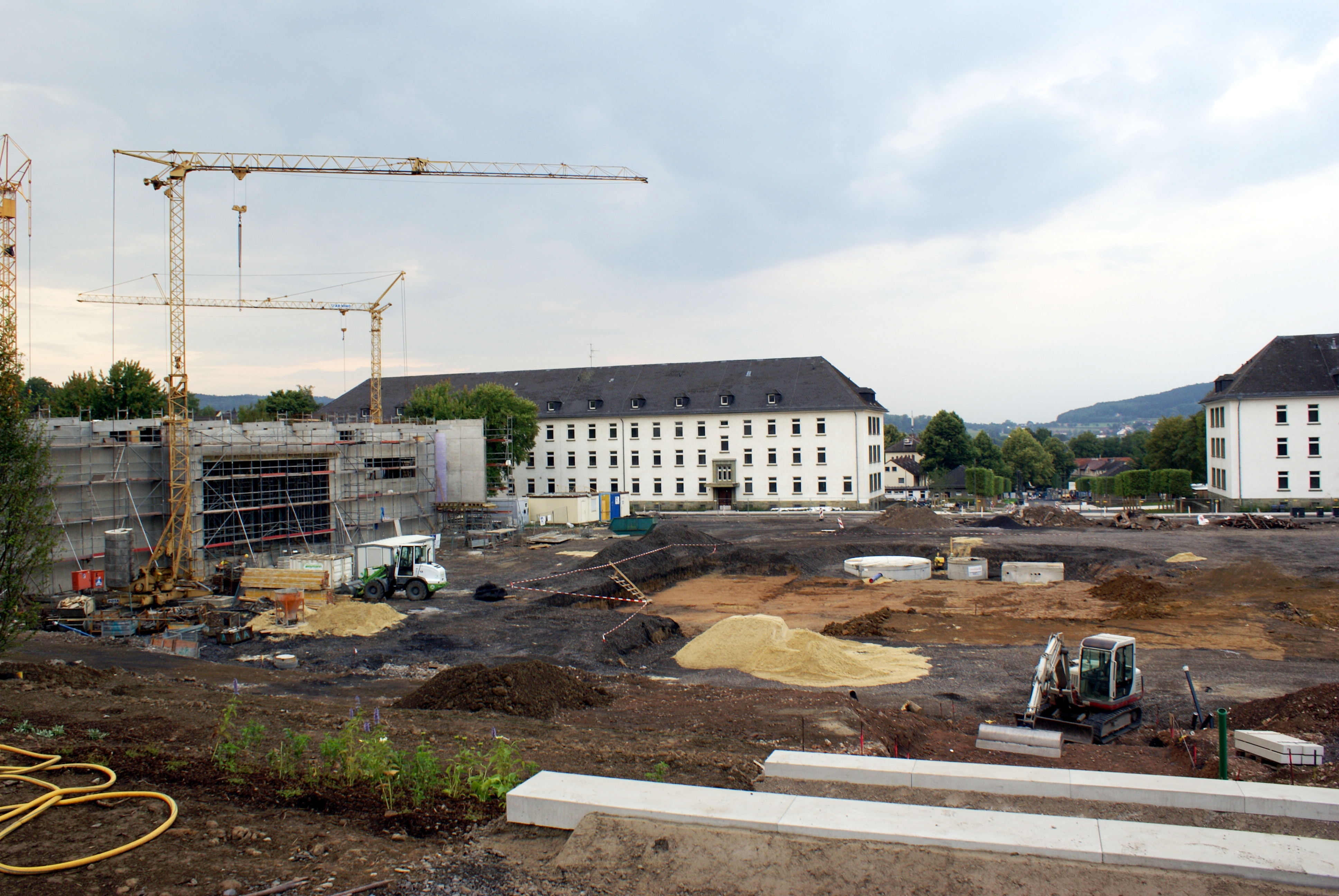 In Bau befindlicher Blücher-Platz der Landesgartenschau Hemer